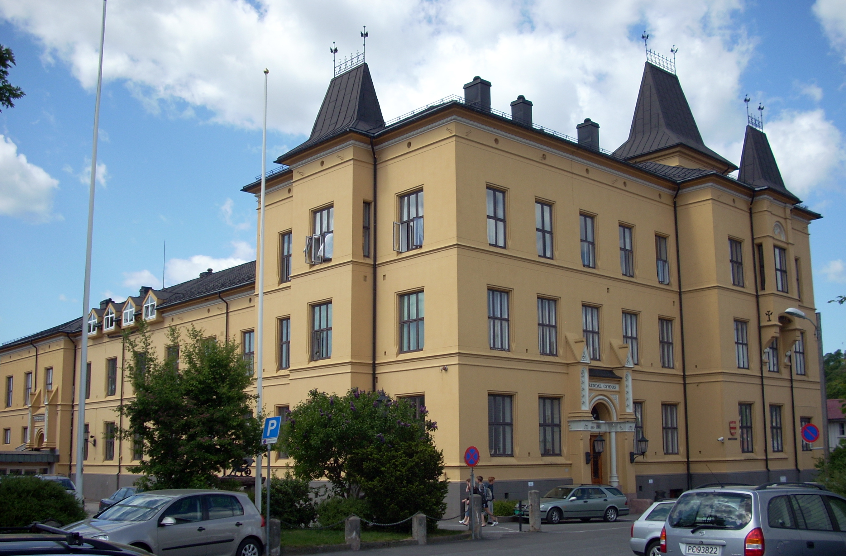 Arendal Videregående skole